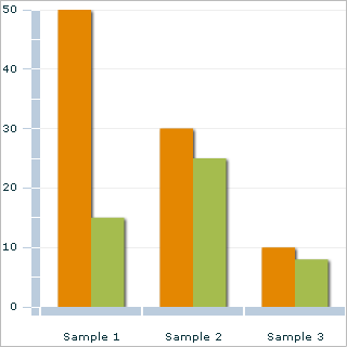 Adobe Flex Charts ?????????? ??????